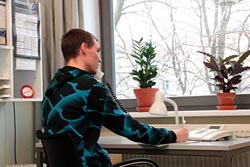 Telefonseelsorge in Aktion.